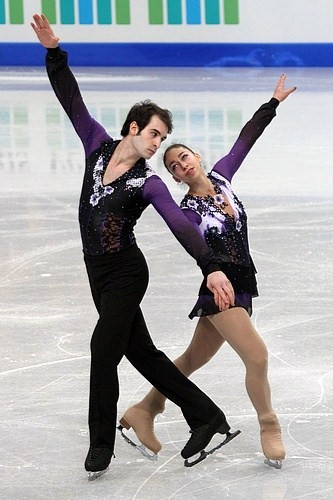 Камиль Мендоза и Кристофер Боядж (Франция) на чемпионате мира по фигурному катанию среди юниоров 2012